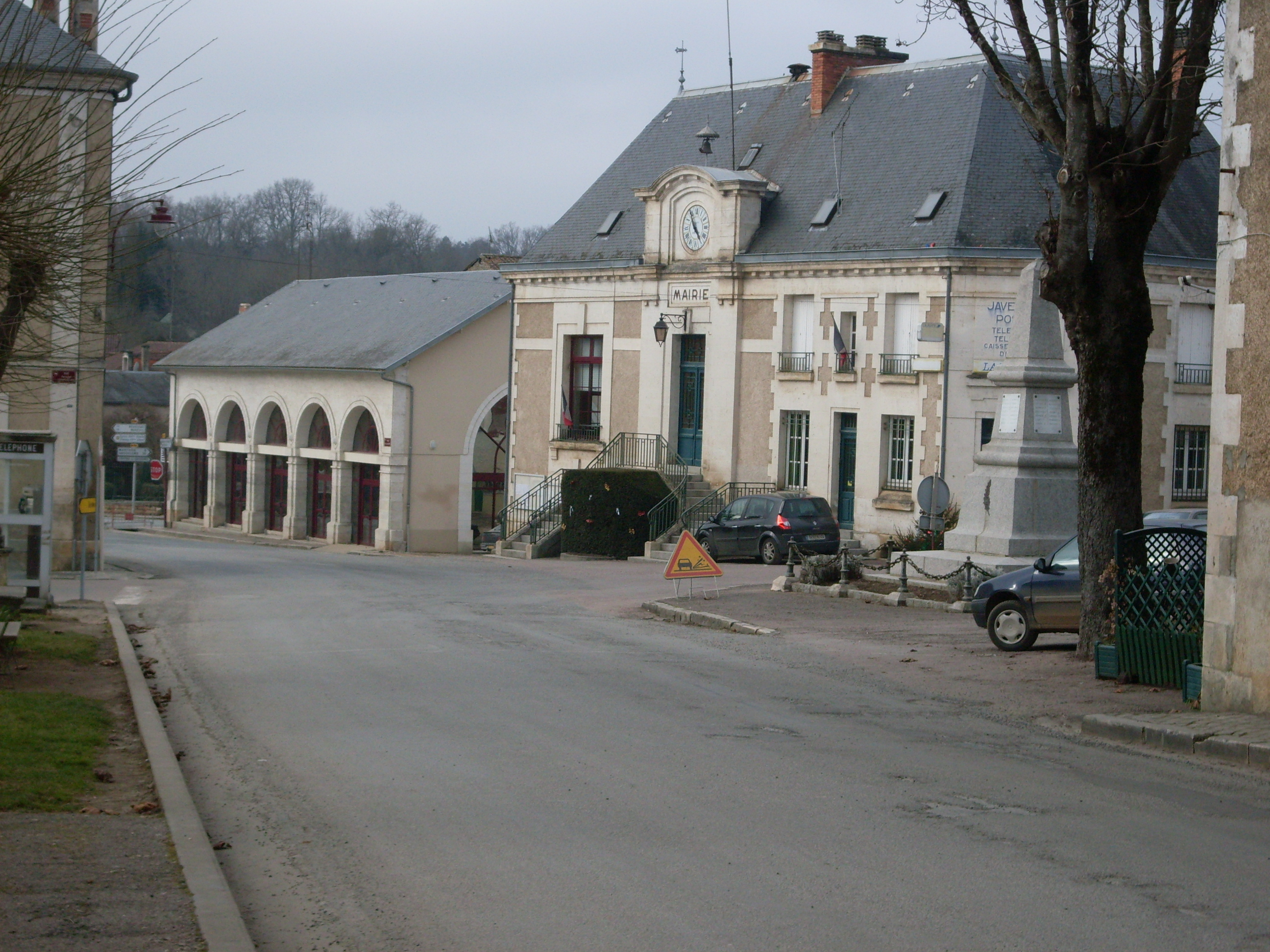 La mairie avec la poste et la salle de la culture